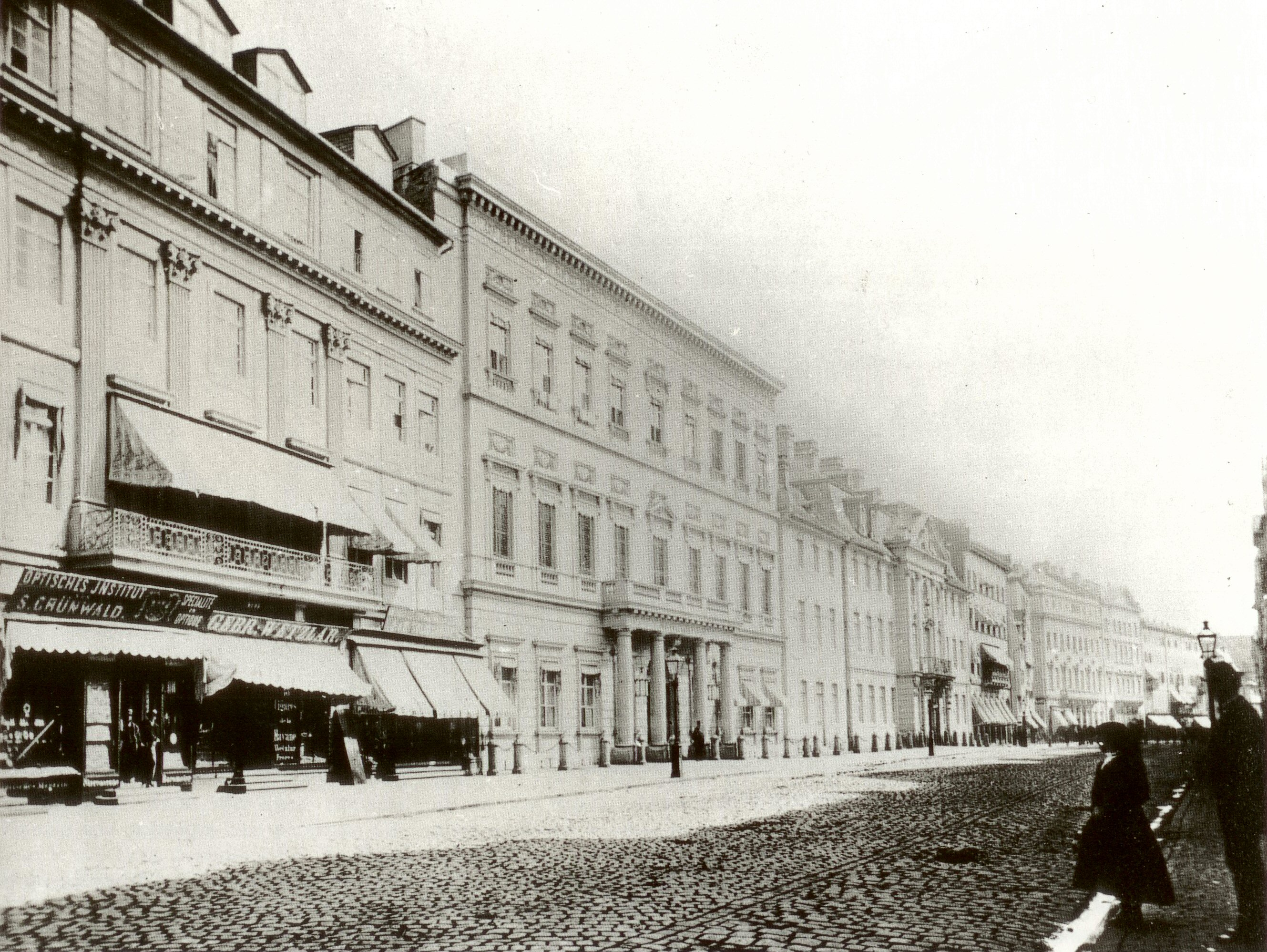 Das Hotel Russischer Hof auf der Zeil, 1794 erbaut von Nicolas de Pigage (1723-1796) für den bayerischen Geheimen Kommerzienrat und kurpfälzischen Bankier Franz Maria Schweitzer (1722-1812) als Palais Schweitzer, damals einer der reichsten Männer der Stadt Frankfurt am Main. Es wurde 1891 abgerissen für den Neubau der Kaiserlichen Hauptpost. Das linke Nachbargebäude war vormals das berühmte Hotel ROTES HAUS, das 1837 für 365.000 Gulden an die Fürsten von Thurn und Taxis verkauft wurde, die es für 125.000 Gulden zum Zentrum der Frankfurter Post ausbauen. 1867 wird das ROTE HAUS mit seiner Postfunktion durch die 1866 erfolgte Anektion Frankfurts durch den preußischen Staat verstaatlicht und ist nach der erfolgten Kaiserreichsgründung 1871 Reichseigentum. Die nun vom Kaiserreich betriebene Post lässt das Gebäude 1879 erneut umbauen und es mit einer Fassade im Stil der italienischen Renaissance versehen. Dafür musste auch das rechts abgebildete Palais "DARMSTÄDTER HOF" mit seinem markanten klassischen Dreiecksgiebel weichen. Das weitläufige Gebäude Darmstädter Hof war seit 1627 im Besitz des hessen-darmstädtischen Fürstenhauses. Vormals, noch als „Klaus Brommes Hof“, wohnte hier Melanchthon, so oft er Frankfurt besuchte.